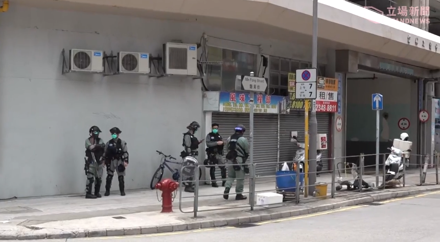 火炭公屋駿洋邨將成隔離營，大批防暴和警員在周邊佈防